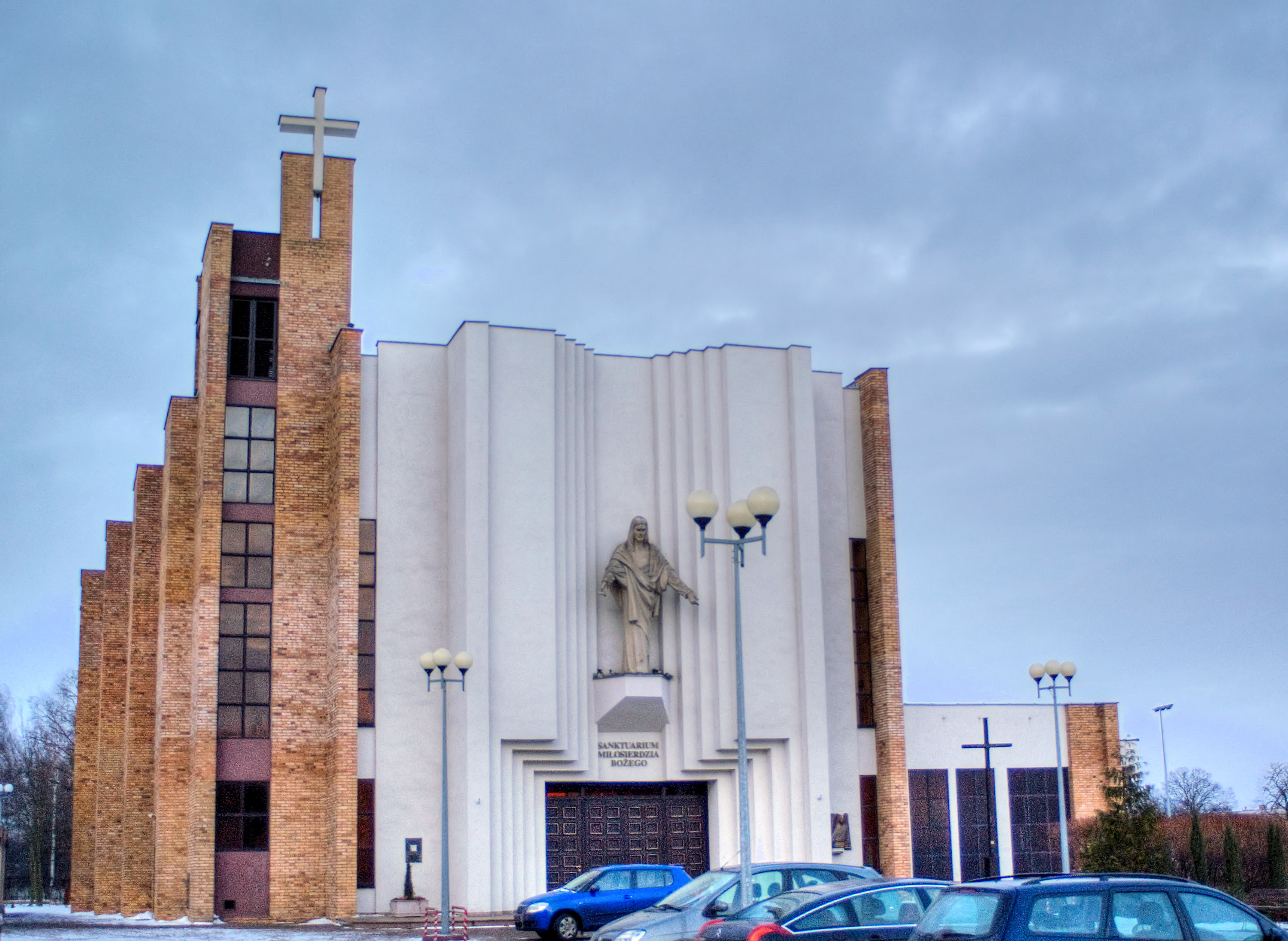 Kościół Miłosierdzia Bożego, os. Sobieskiego, Poznań, Polska